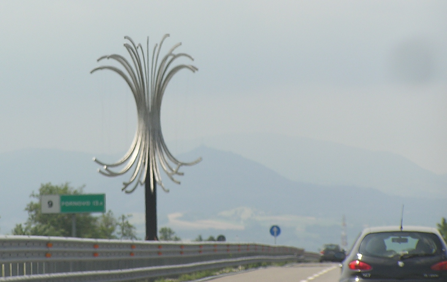 Monumento della A15 rivolto verso gli automobilisti provenienti dalla A1.